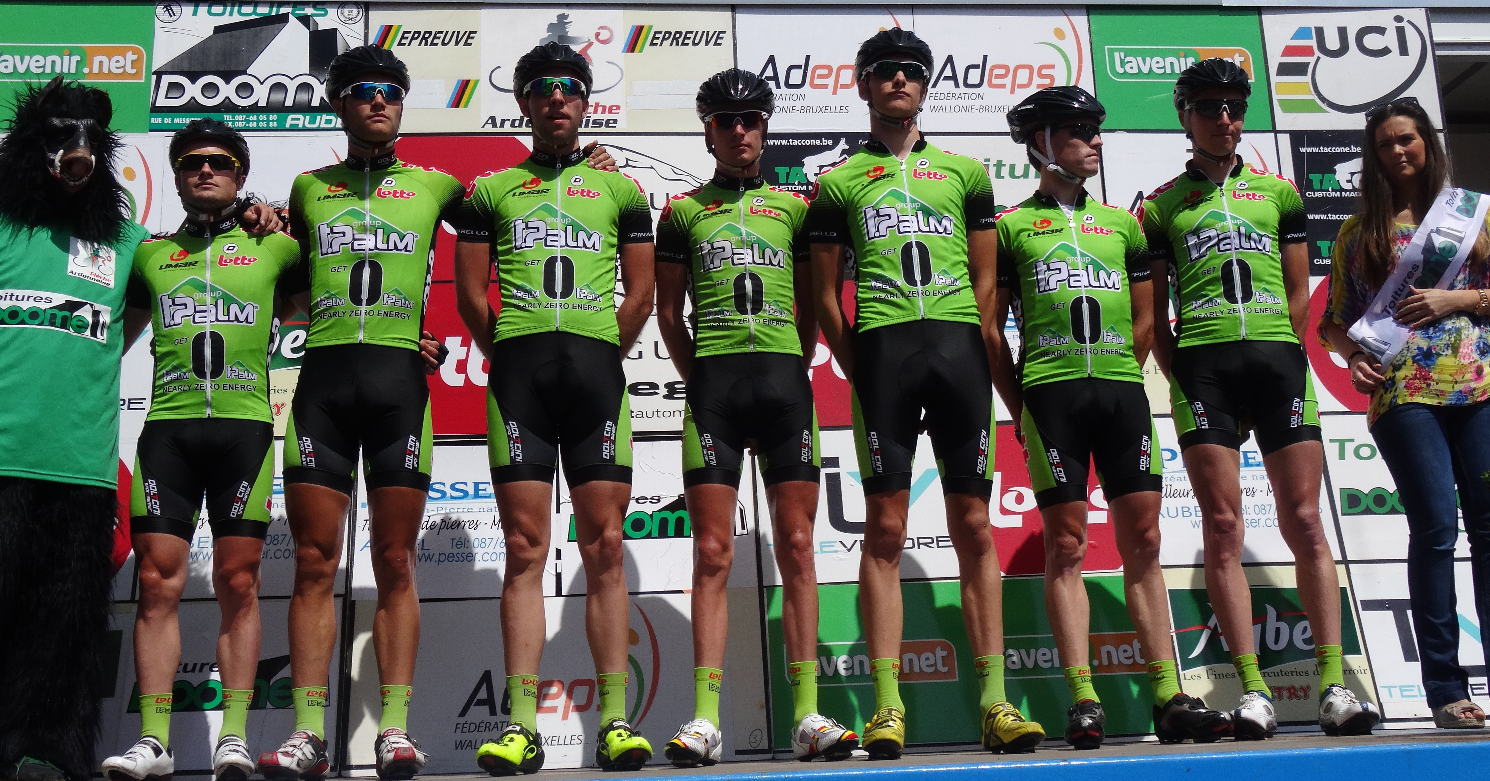 Reportage photographique réalisé le dimanche 22 juin à l'occasion du départ et de l'arrivée de la Flèche ardennaise 2014 à Herve, Belgique.